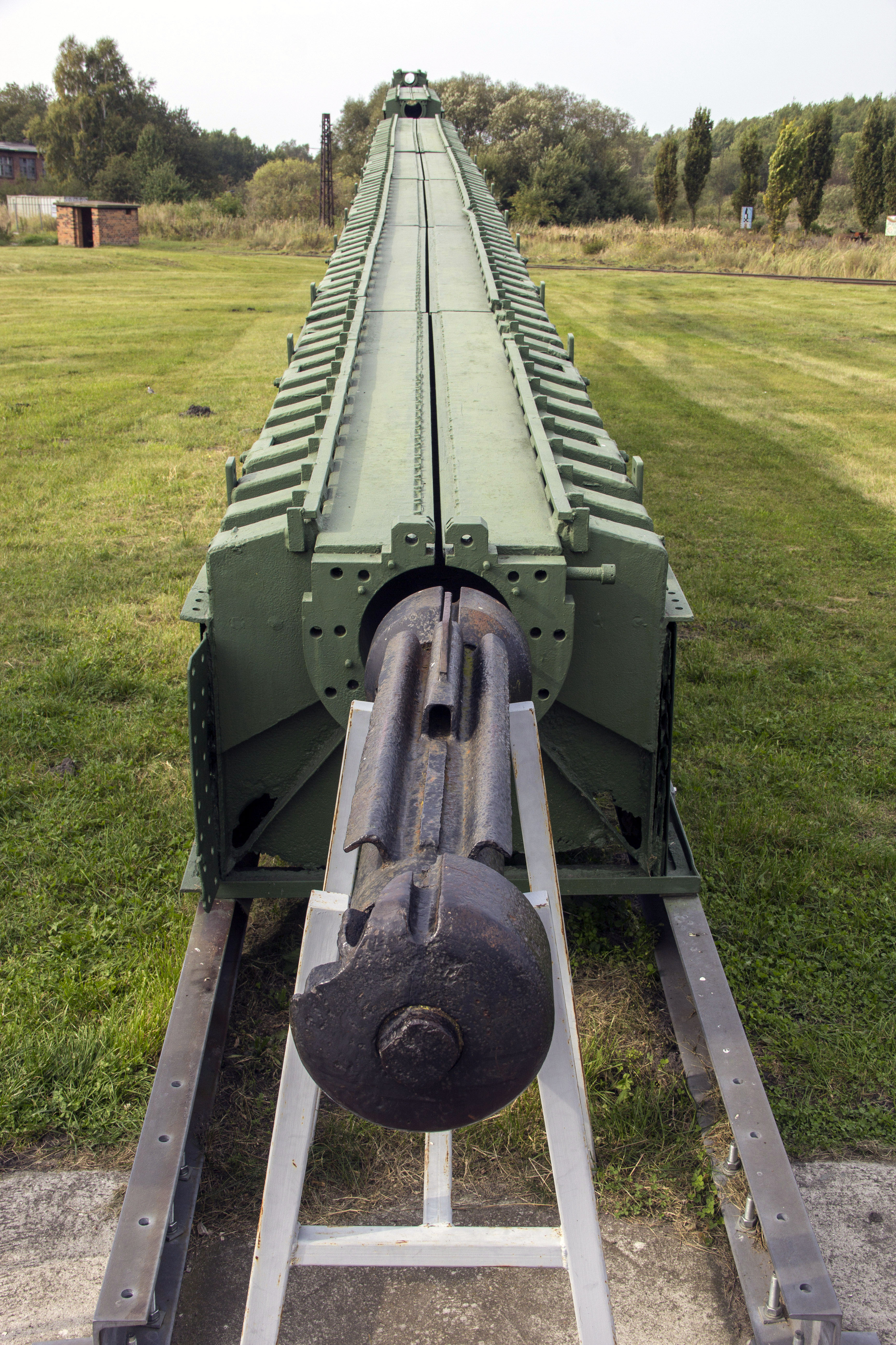 Peenemünde, Museum, V1, Abschussrampe